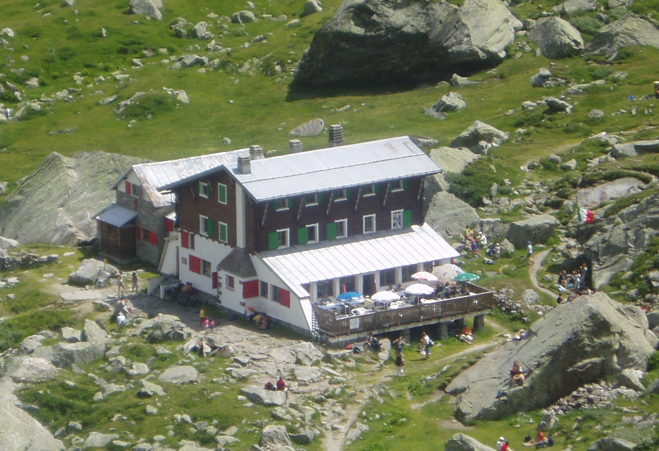 Rifugio Zamboni-Zappa